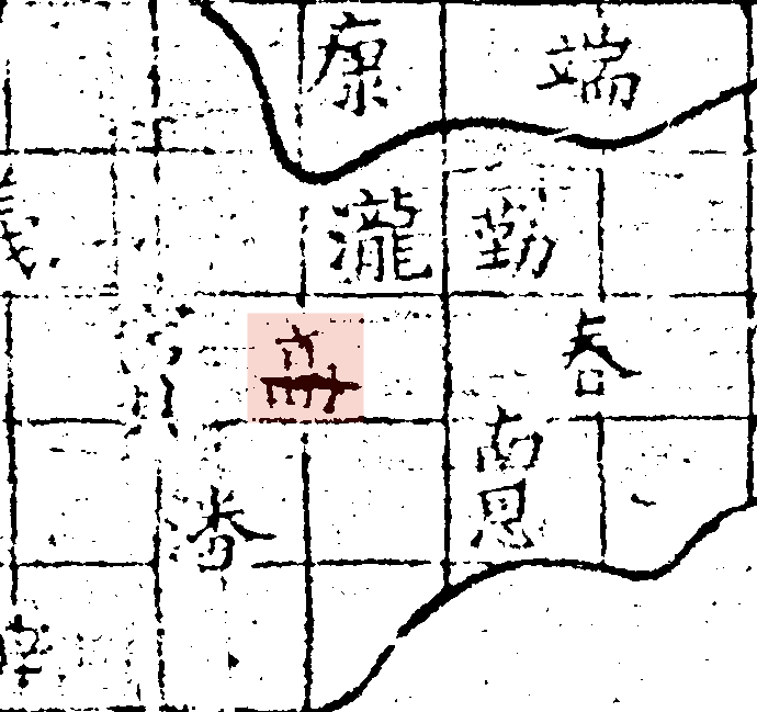 粵語: 禹跡圖中嘅高州